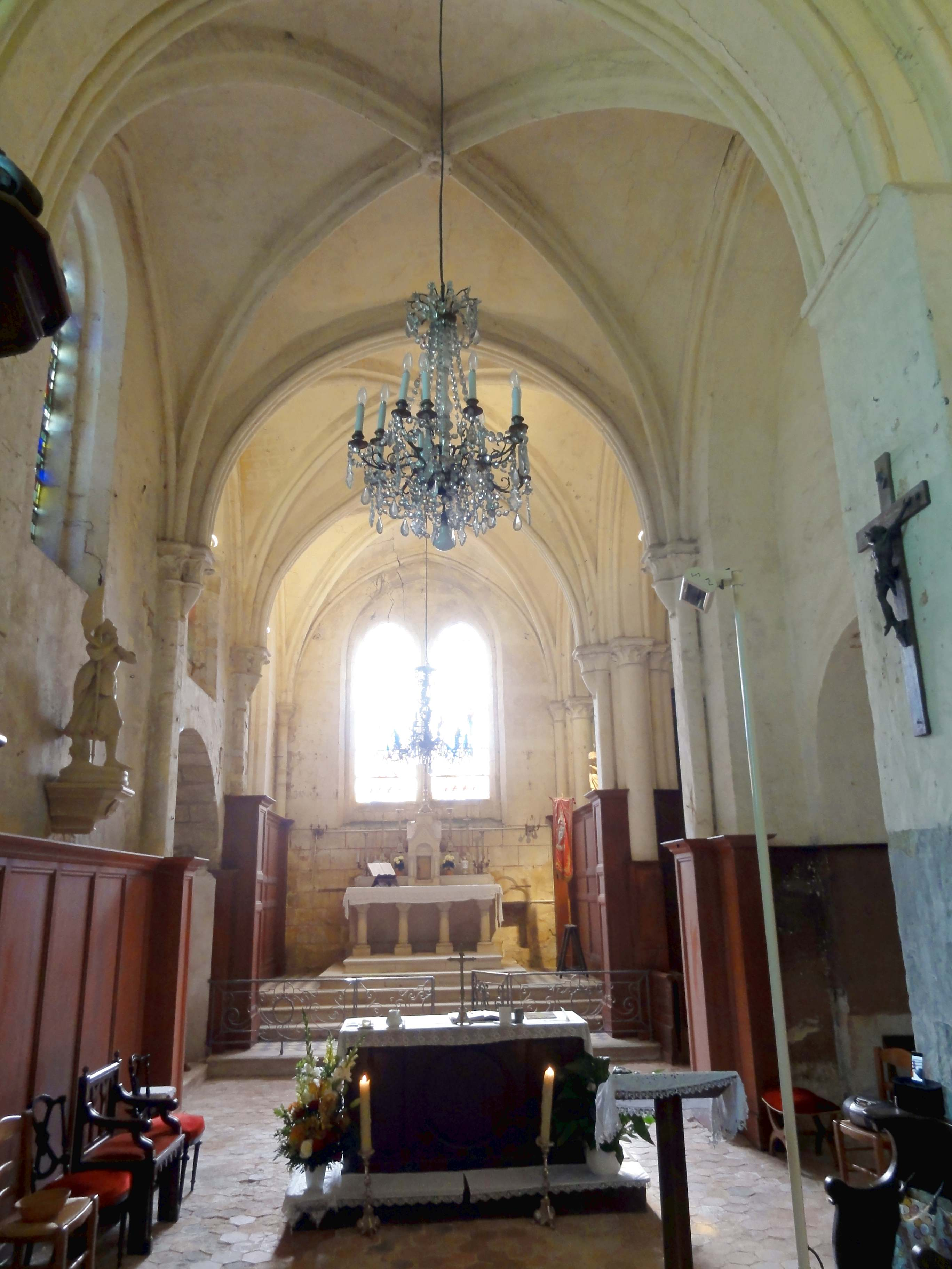 Intérieur de l'église - voir titre.